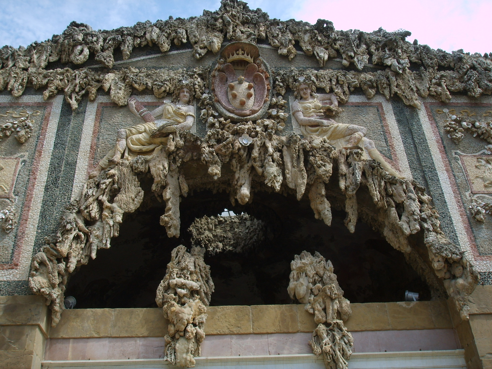 Grotta del buontalenti, esterno dettaglio